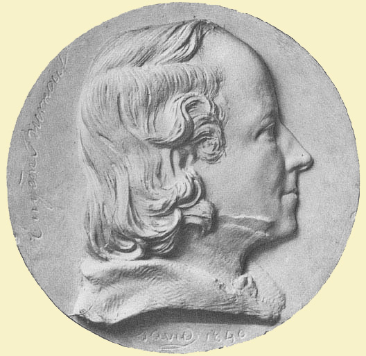 Portrait de Eugène Burnouf (1801-1852), académicien français.